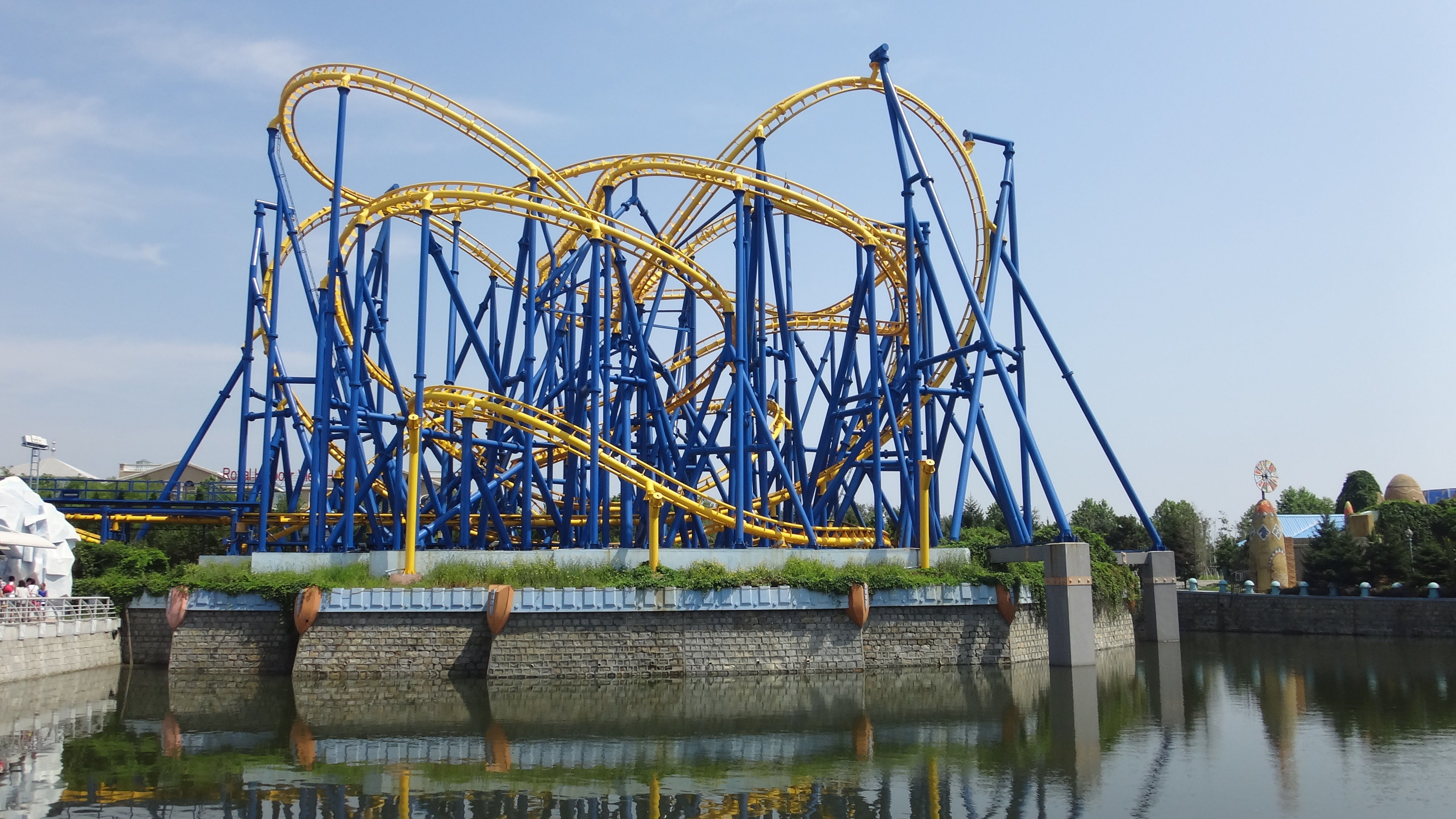 中文（中国大陆）: 大连金石滩地区发现王国的过山车“疯狂眼镜蛇”。